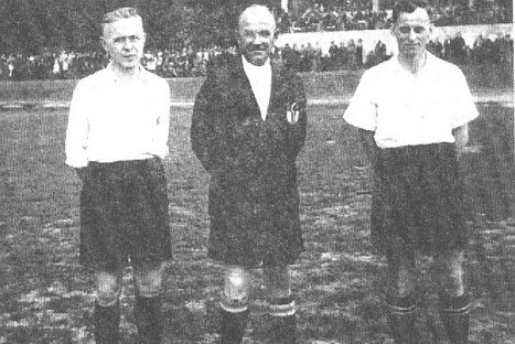 Władysław Przybysz - piłkarz, sędzia międzynarodowy